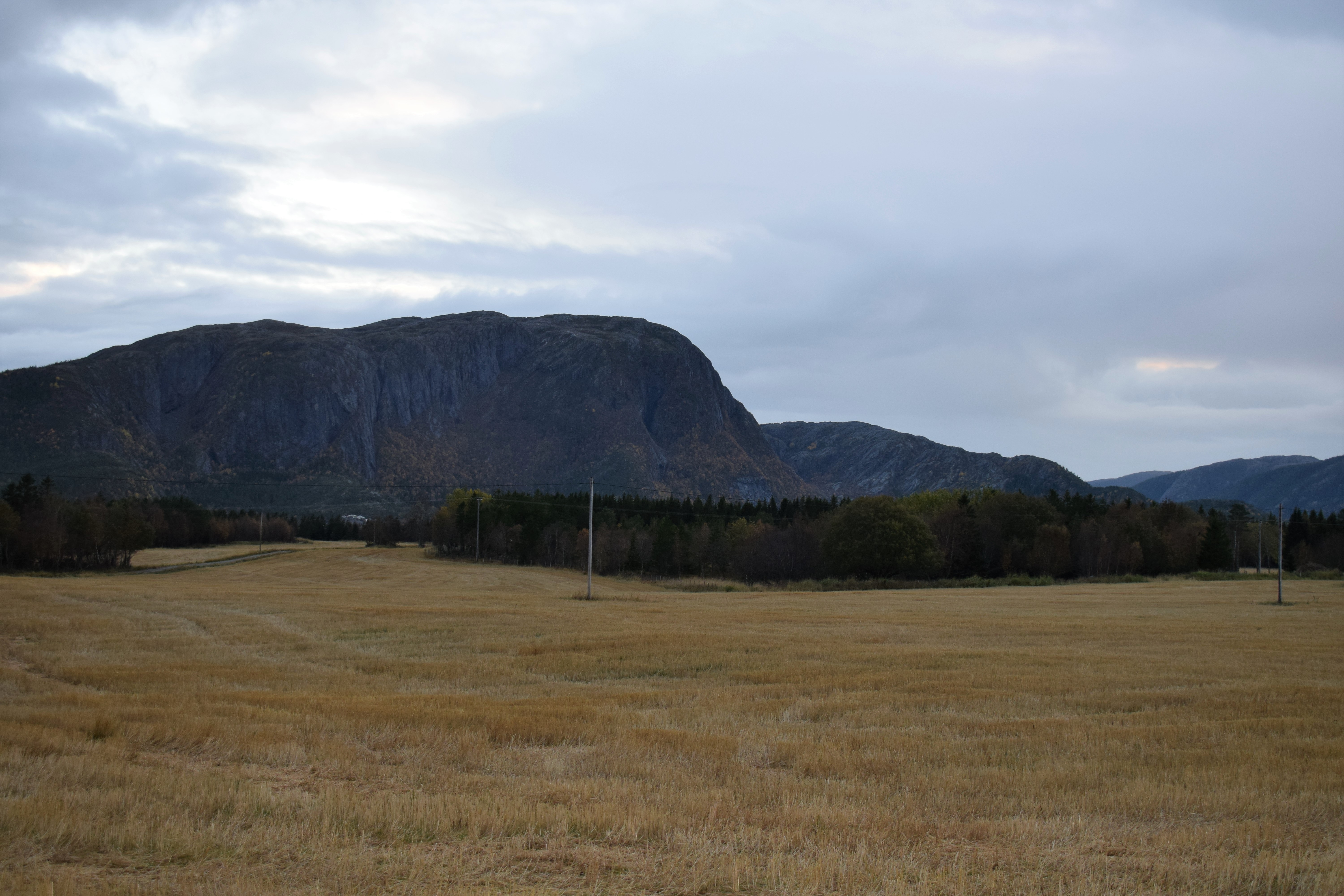 Åkerlandskap på Salsnes med utsikt mot Galten (446 moh.) i sør.